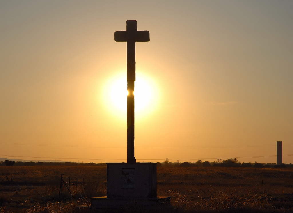 Cruz de Plasencia (Saucedilla, Cáceres)